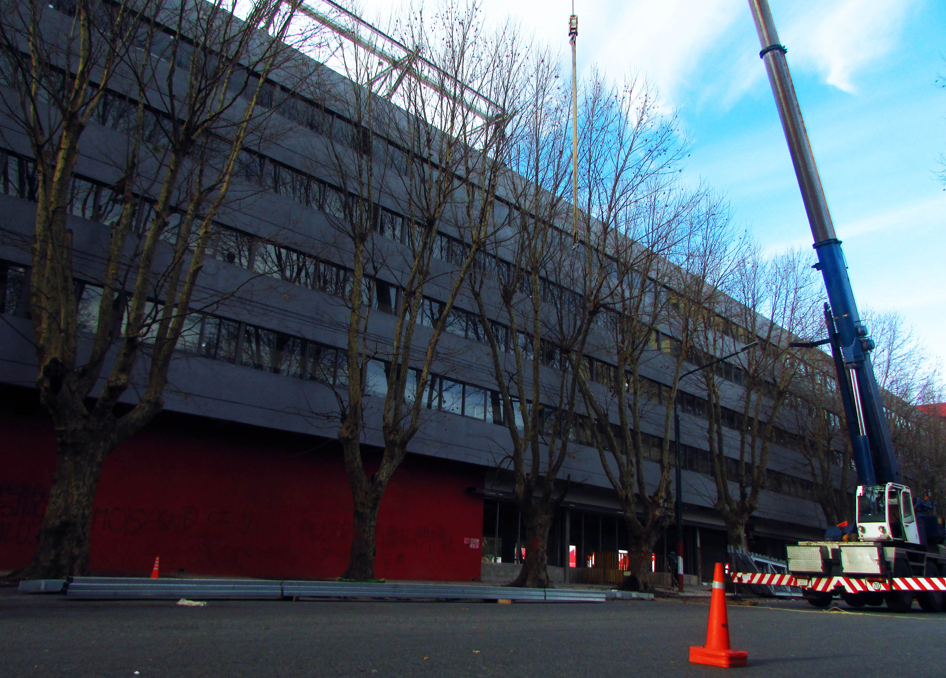 Colocación del techo sobre la zona de los nuevos palcos, en avenida 1, del estadio del Club Estudiantes de La Plata, a junio de 2019.